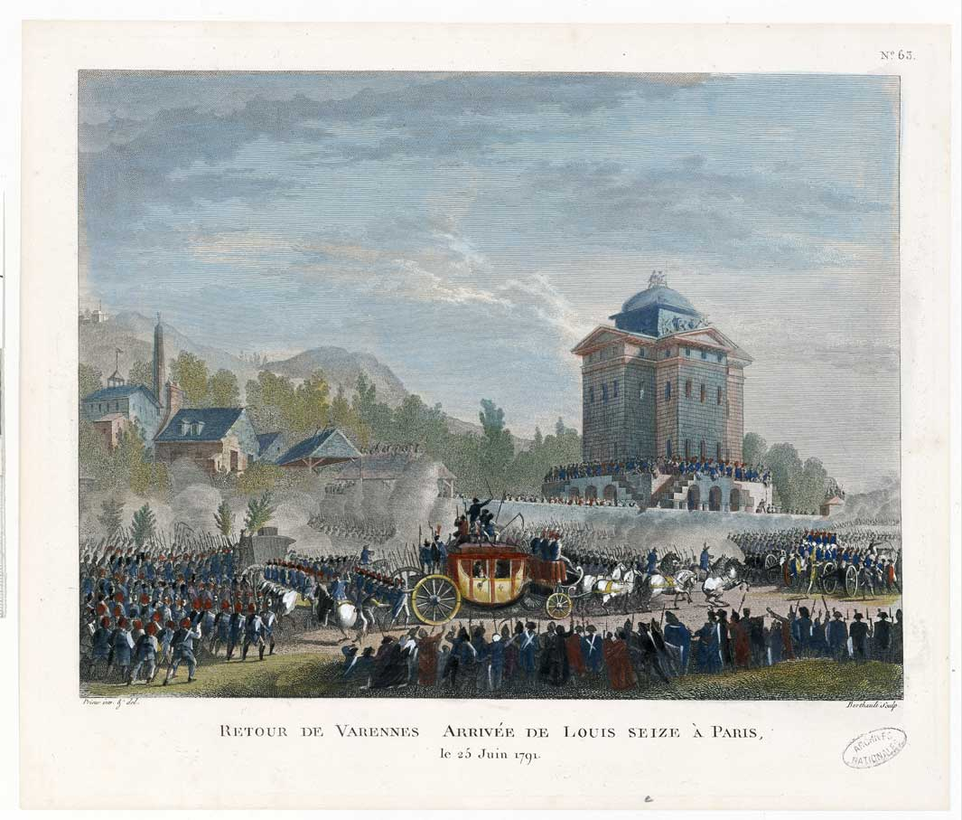 Grvaure de Jean Duplessi-Bertaux (1750?-1819)